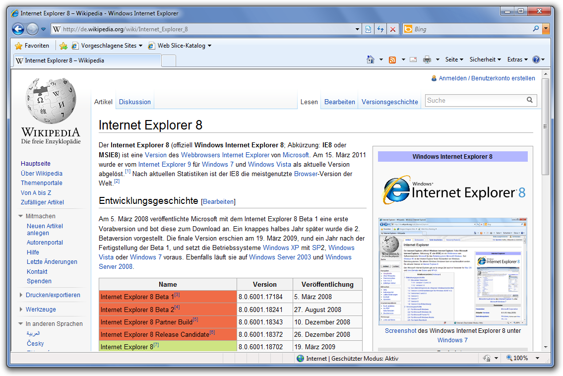 Bildschirmfoto von Windows Internet Explorer 8 unter Microsoft Windows 7.